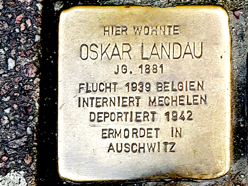 Stolperstein für Oskar Landau, Jg. 1881, geflüchtet nach Belgien 1939, interniert in Machelen, deportiert 1942, ermordet im Vernichtungslager Auschwitz